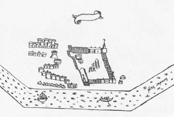 Изображение Гижигинской крепости, сделанное Василием Щетниковым